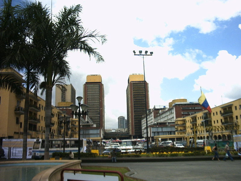 El Silencio and the Centro Simón Bolívar